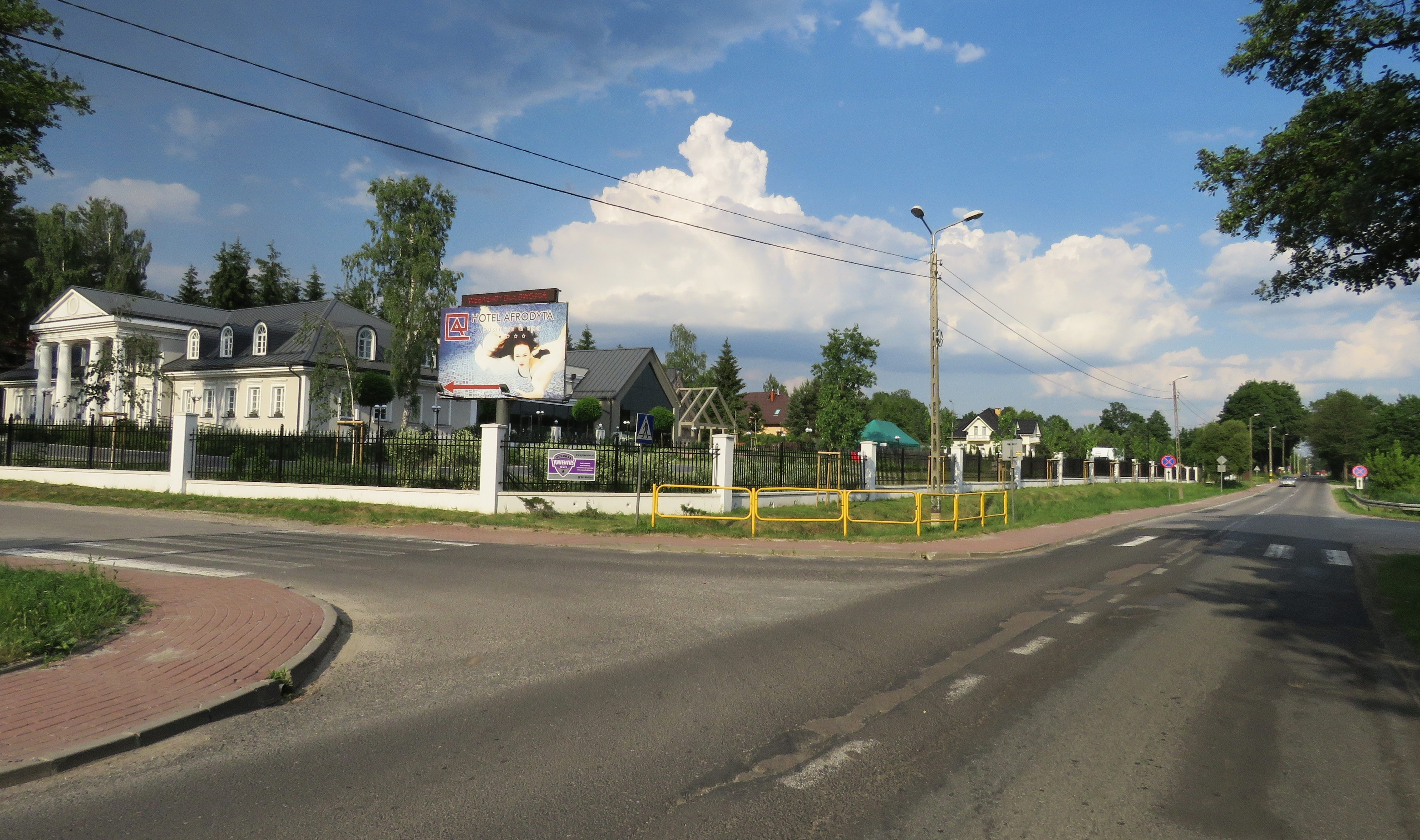 Tartak Brzózki